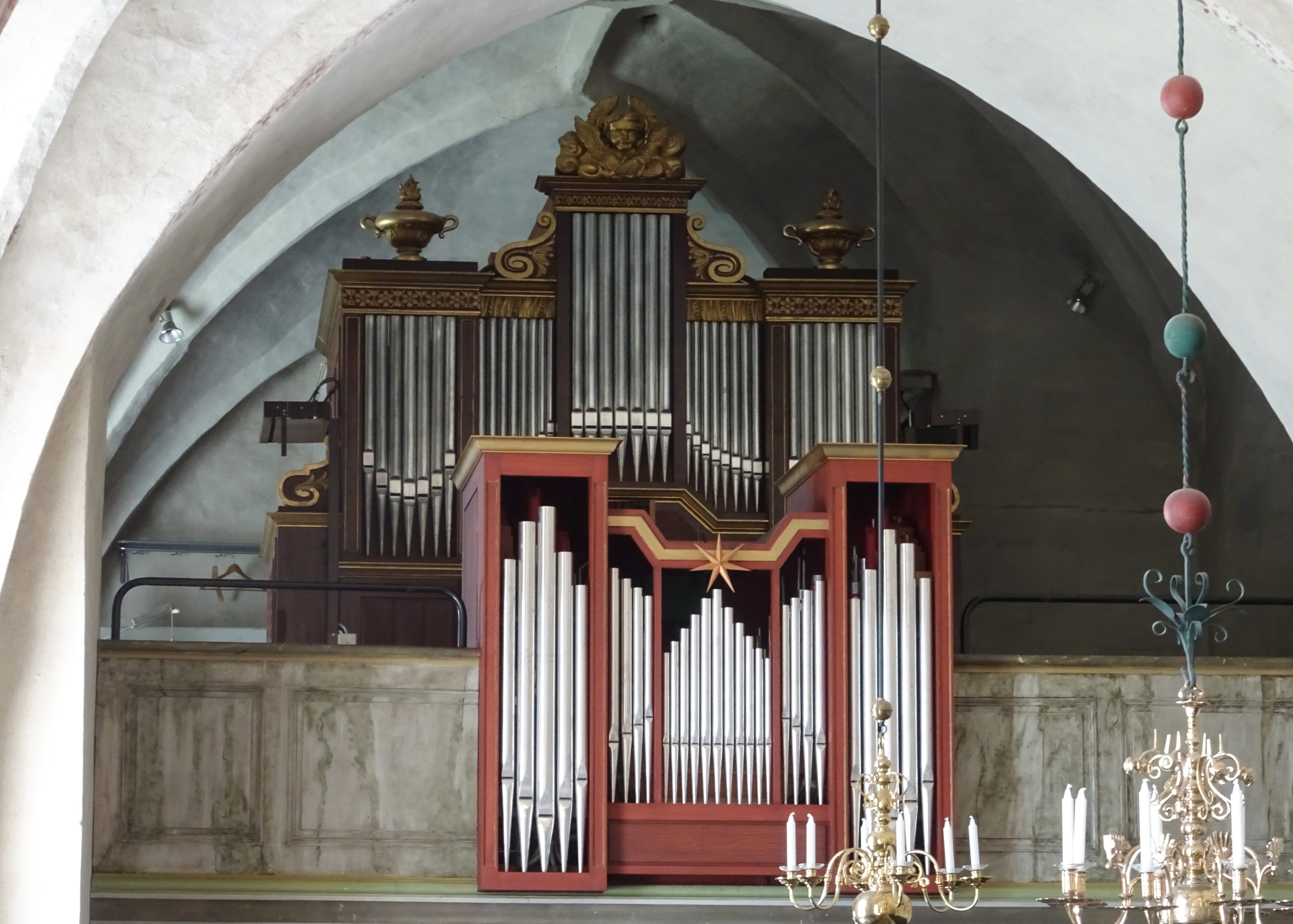 Trosa lands kyrka, interiör